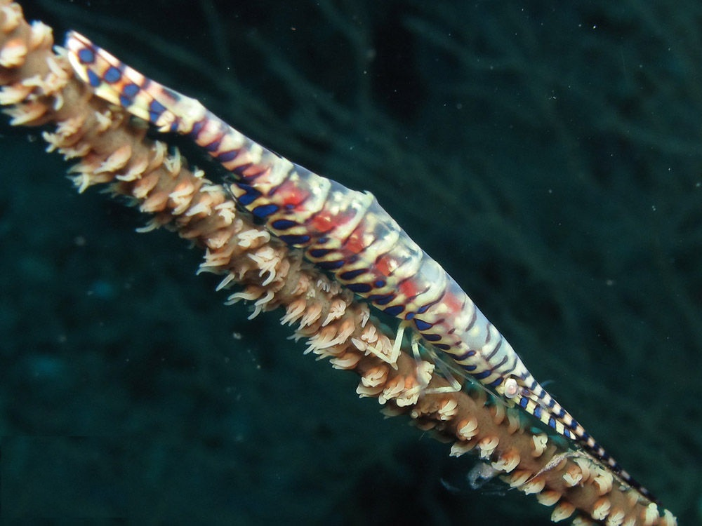 Tozeuma armatum, Koh Phangan, Tailandia